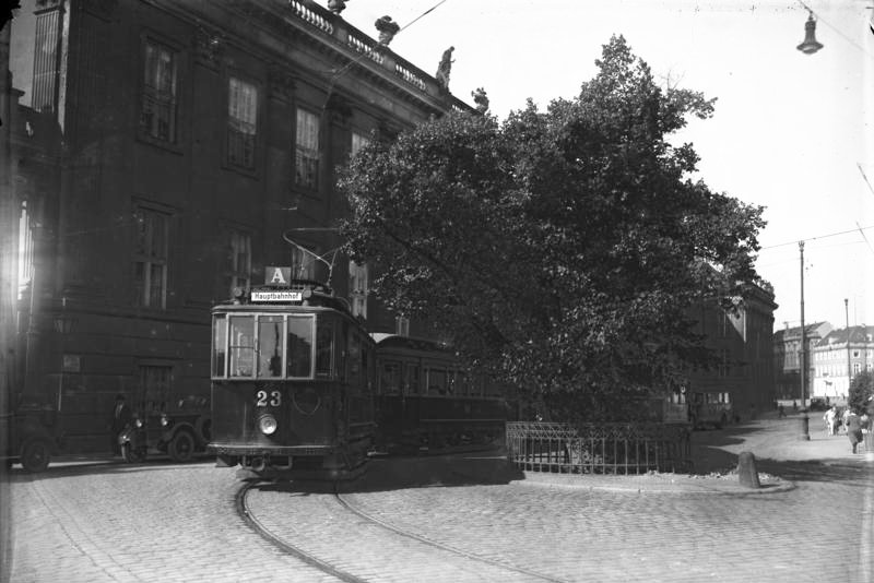 Die historische Bittschriften-Linde am Stadt-Schloss in Potsdam soll wegen Verkehrshindernis entfernt werden. Blick auf die historische Bittschrifen-Linde am Stadtschloss in Potsdam.